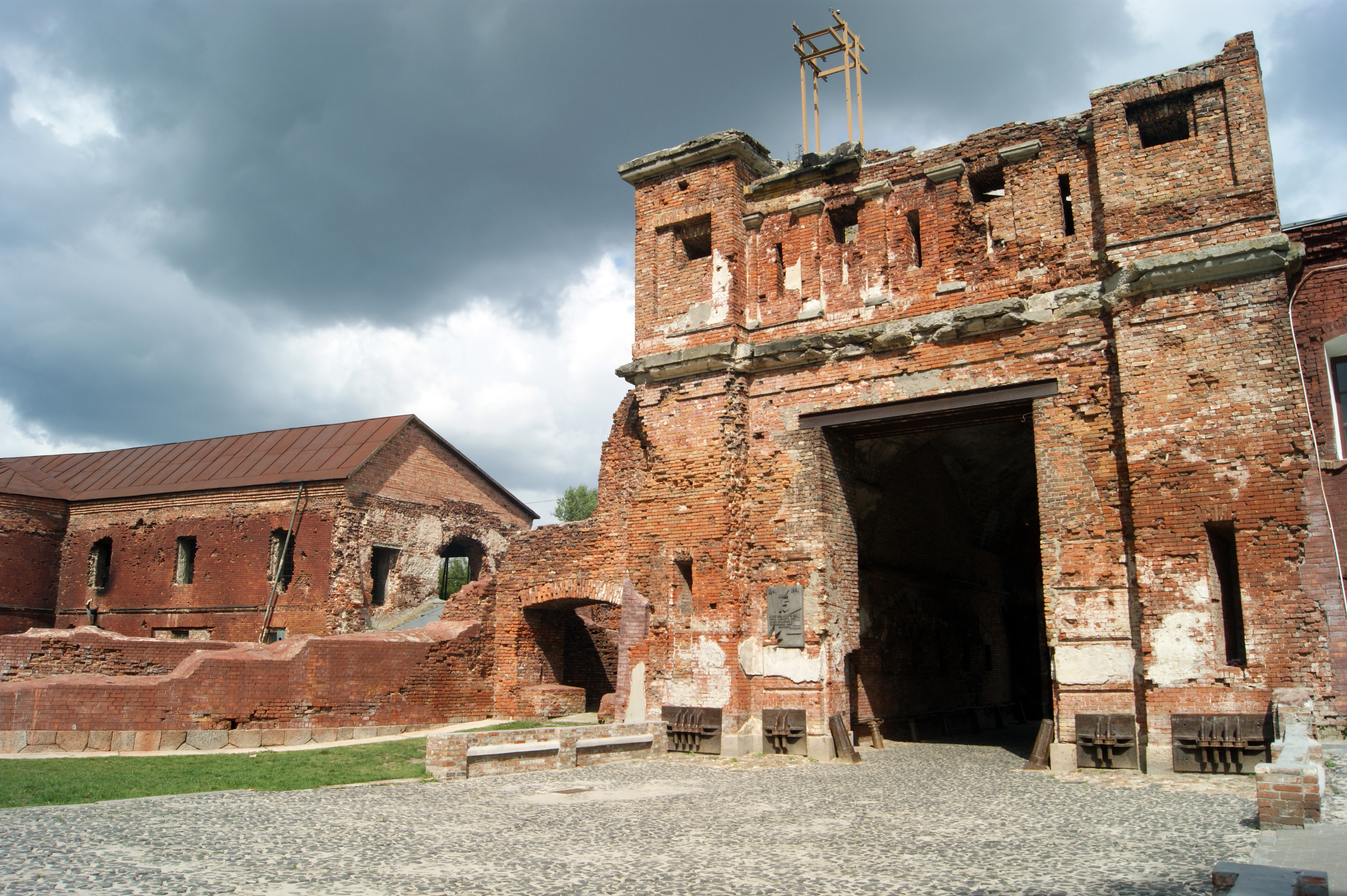 Беларуская (тарашкевіца): Цытадэль — абарончая казарма, руіны Белага палаца, Інжынэрнага ўпраўленьня, Арсэналу, казармы пагранічнікаў, падмурак сталовай каманднага складу. г. Берасьце This is a photo of Belarusian heritage monument. Reference number: 110Г000724 ( WLM)